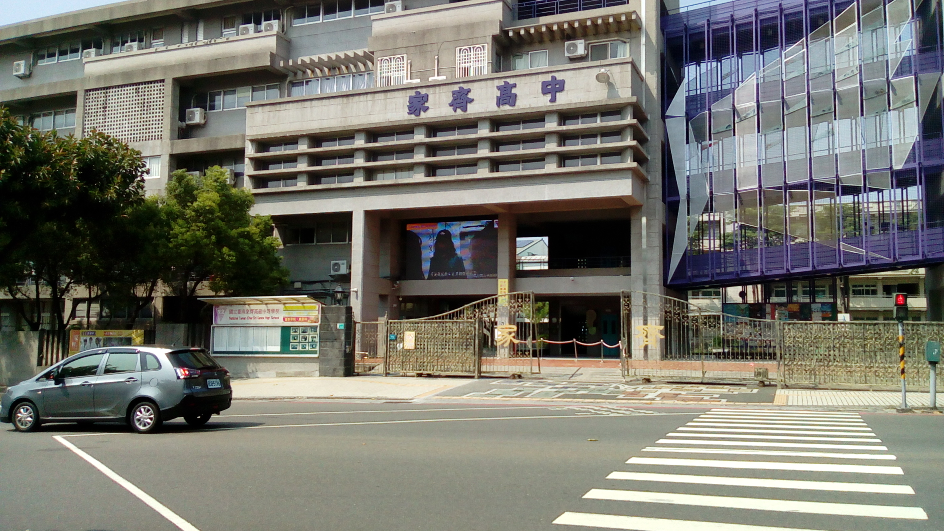 南商斜對面 健康路二段上